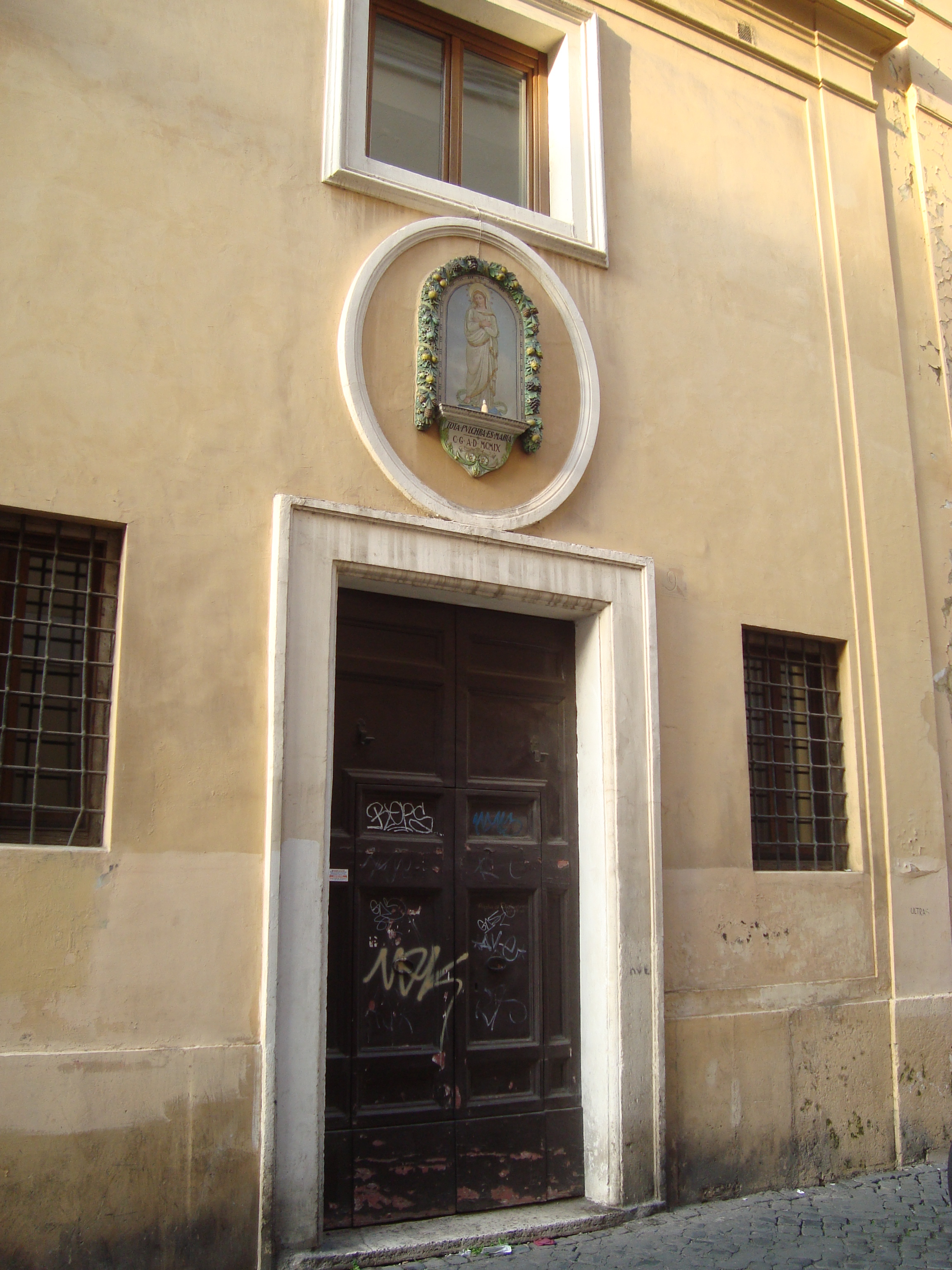 Oratoire Santa Maria Immacolata della Concezione de Rome